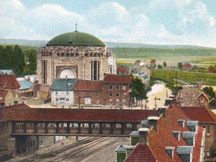 Detail van ingekleurde ansichtkaart met een gezicht naar het zuiden vanaf Station Maastricht met de passarelle (voetgangersbrug) en de deels voltooide Koepelkerk. Fotocollectie RHCL Maastricht, GAM 6991.